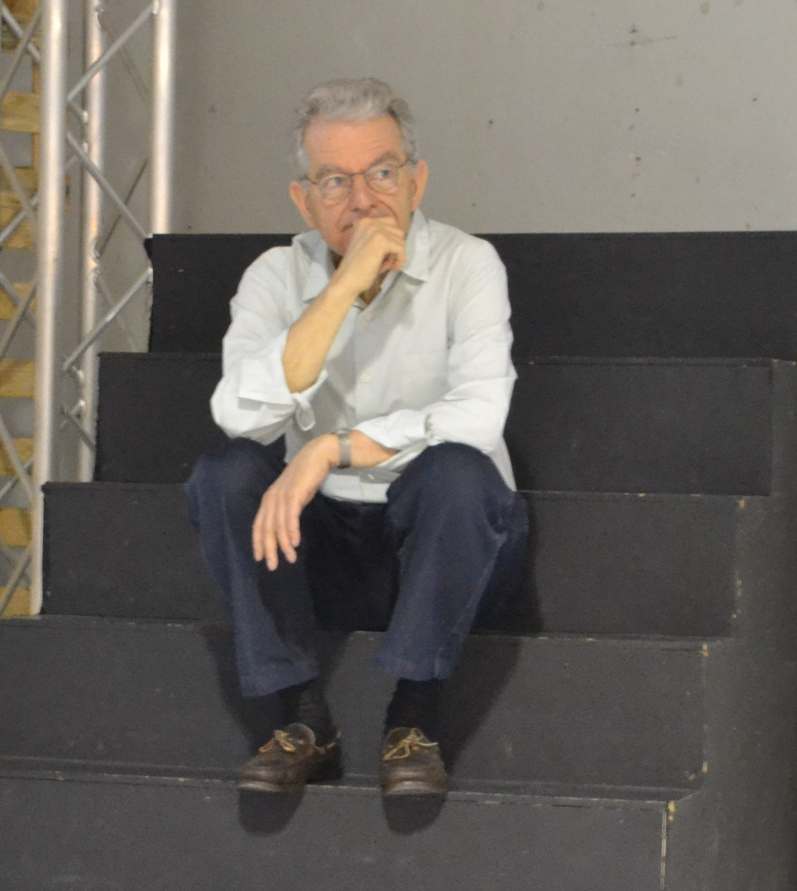 Miguel Aguiló Alonso, Curso de verano UC